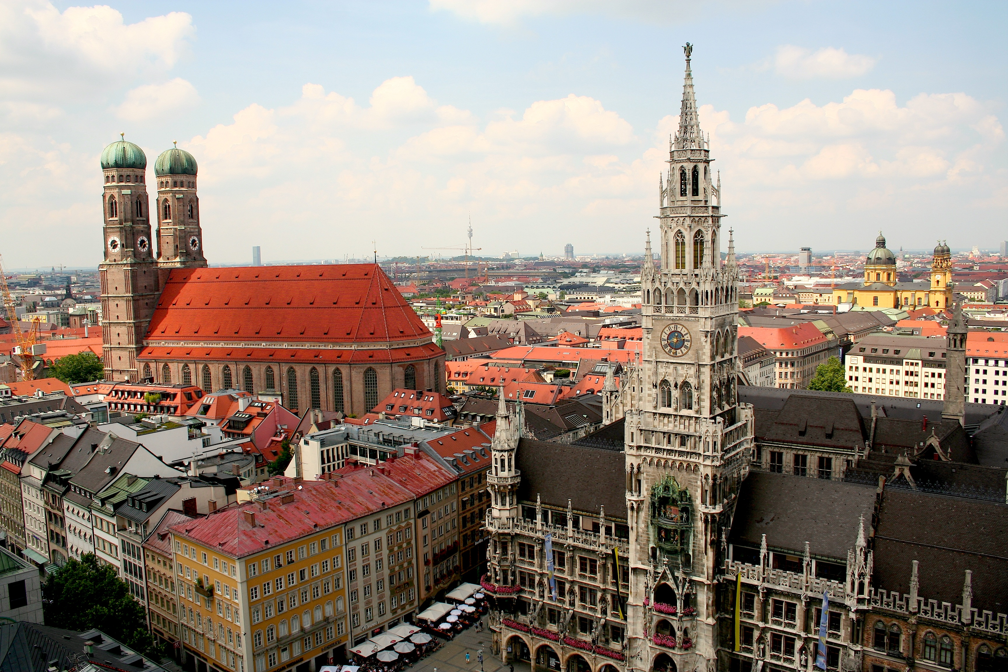 Altstadt Richtung Frauenkirche vom Alten Peter